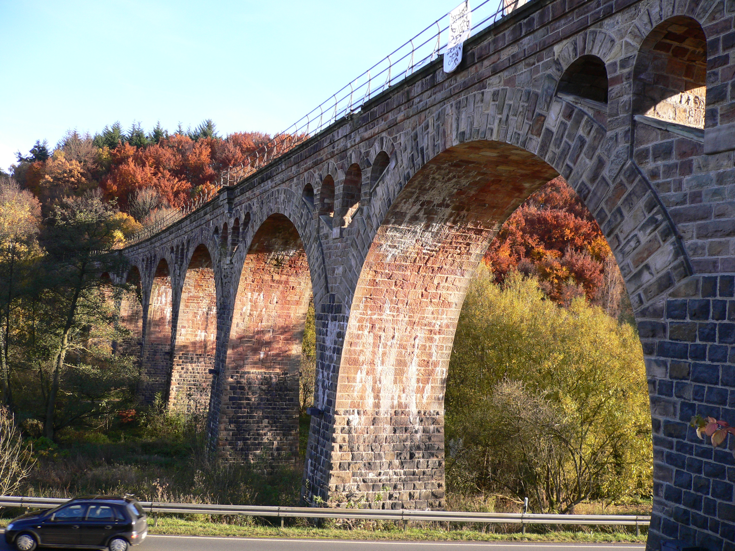 Eisenbahnviadukt bei Endbach